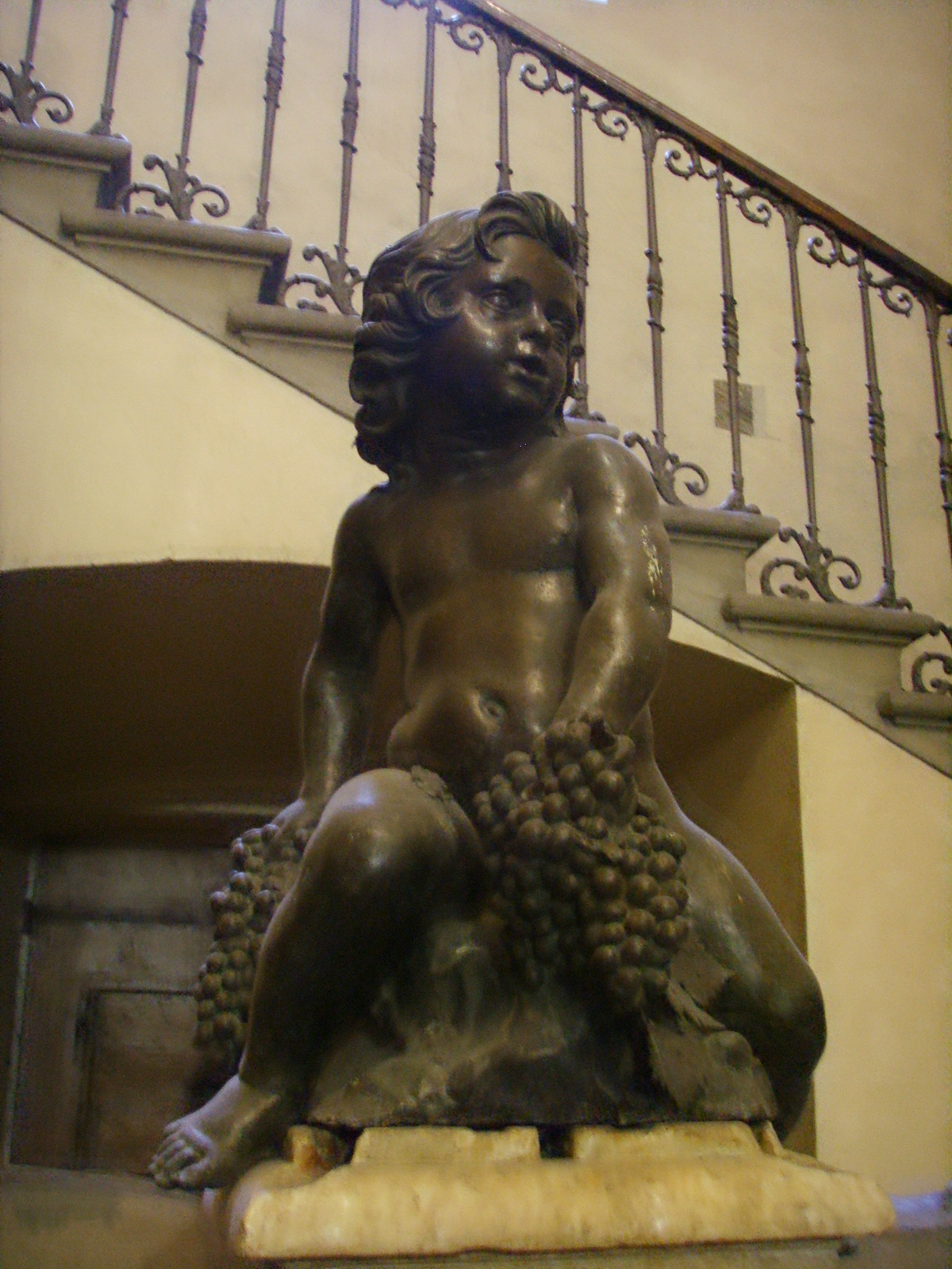 Fontana del bacchino, originale